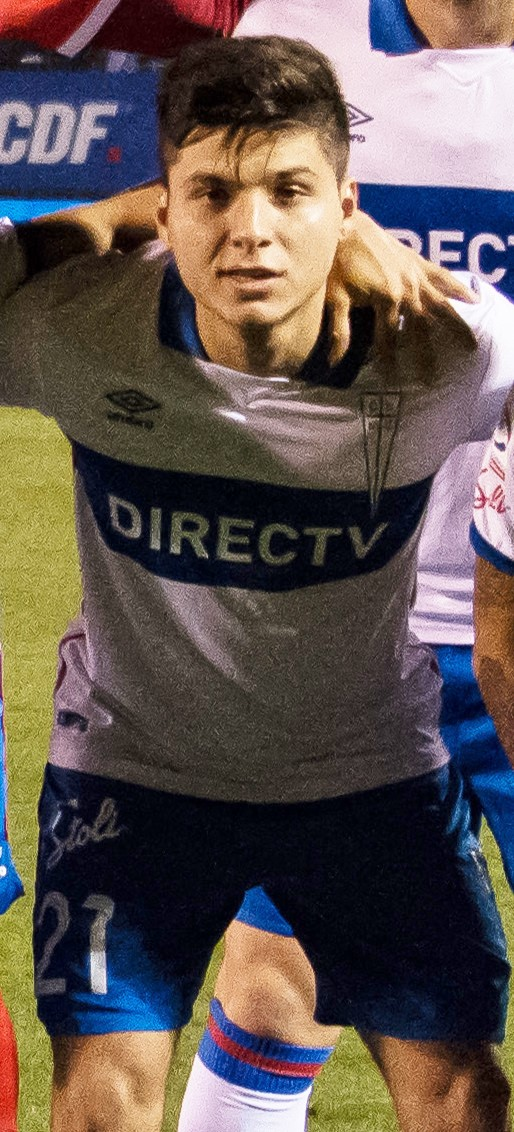 Universidad Católica v Huachipato, Estadio San Carlos de Apoquindo, Las Condes, Santiago, Chile.